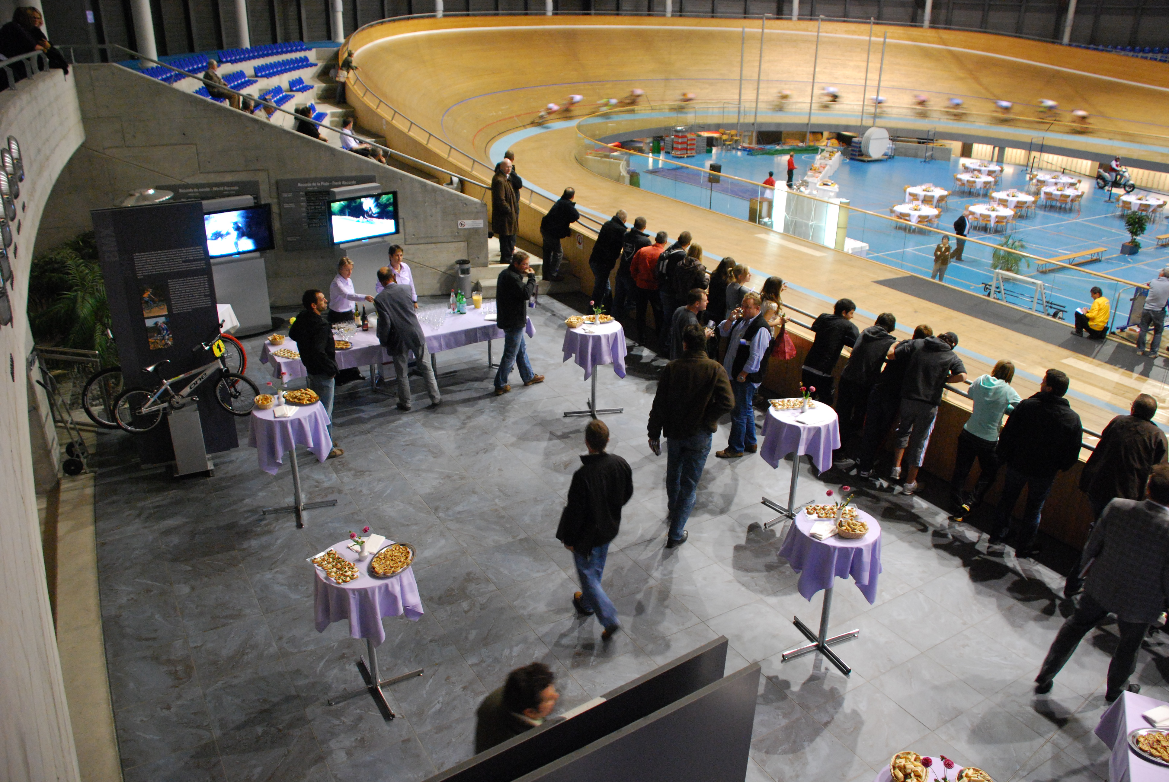 Vélodrome du CMC